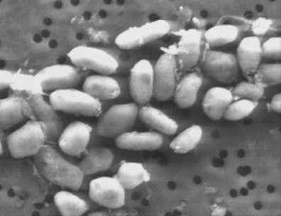 GFAJ-1